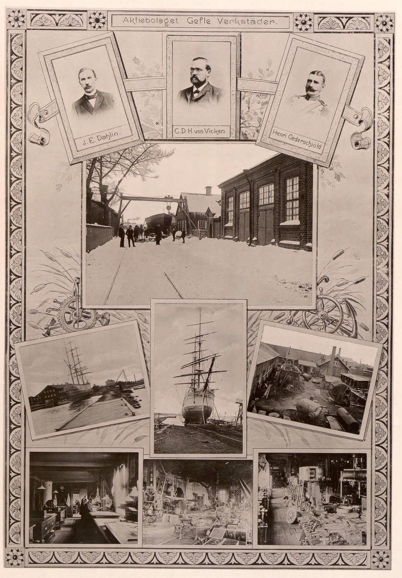 Gefle Verkstäder Verkställande direktör von Vicken, G D H, Disponent Styrelsemedlemmar Dahlin, J E, Amiralitetsråd Jacob Efraim Dahlin (Q19196223) Cederschiöld, Henri, Major von Vicken, G D H, Disponent (vd) Georg David Henrik von Vicken (Q87783868)